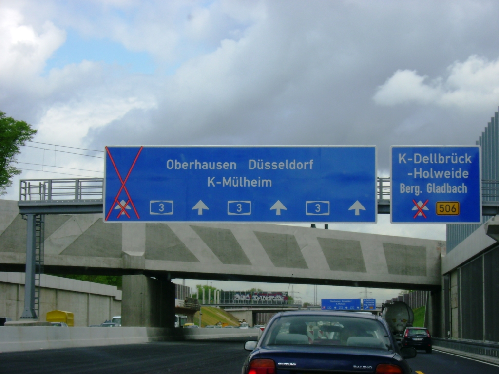 Kölner Autobahnring (A3), kurz vor der Freigabe aller Fahrspuren.